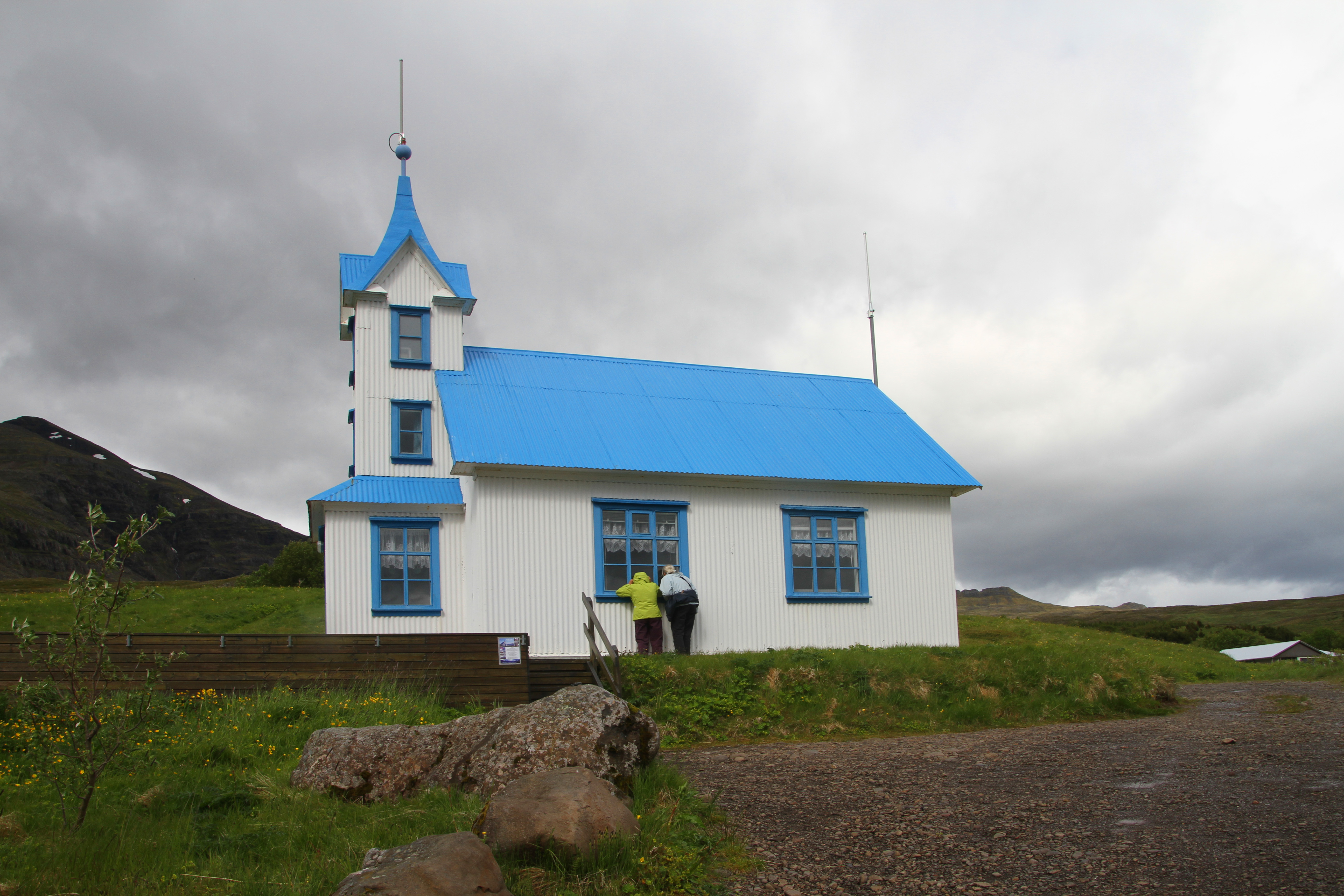 Stöðvarfjörður